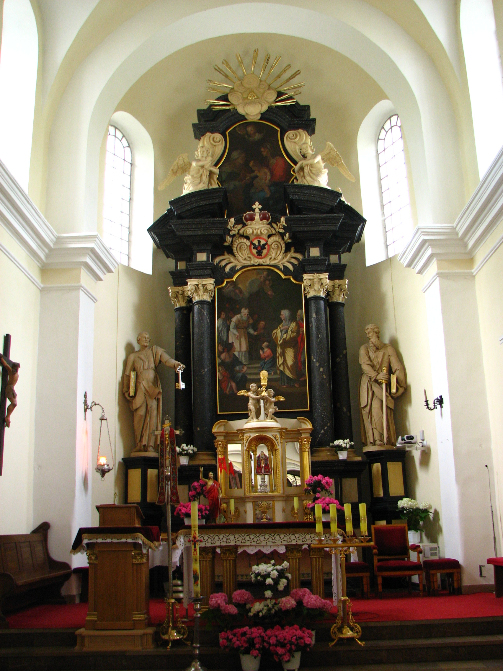 Biała Podlaska, kościół św.Anny, widok na prezbiterium i ołtarz główny Autor: Krzys L